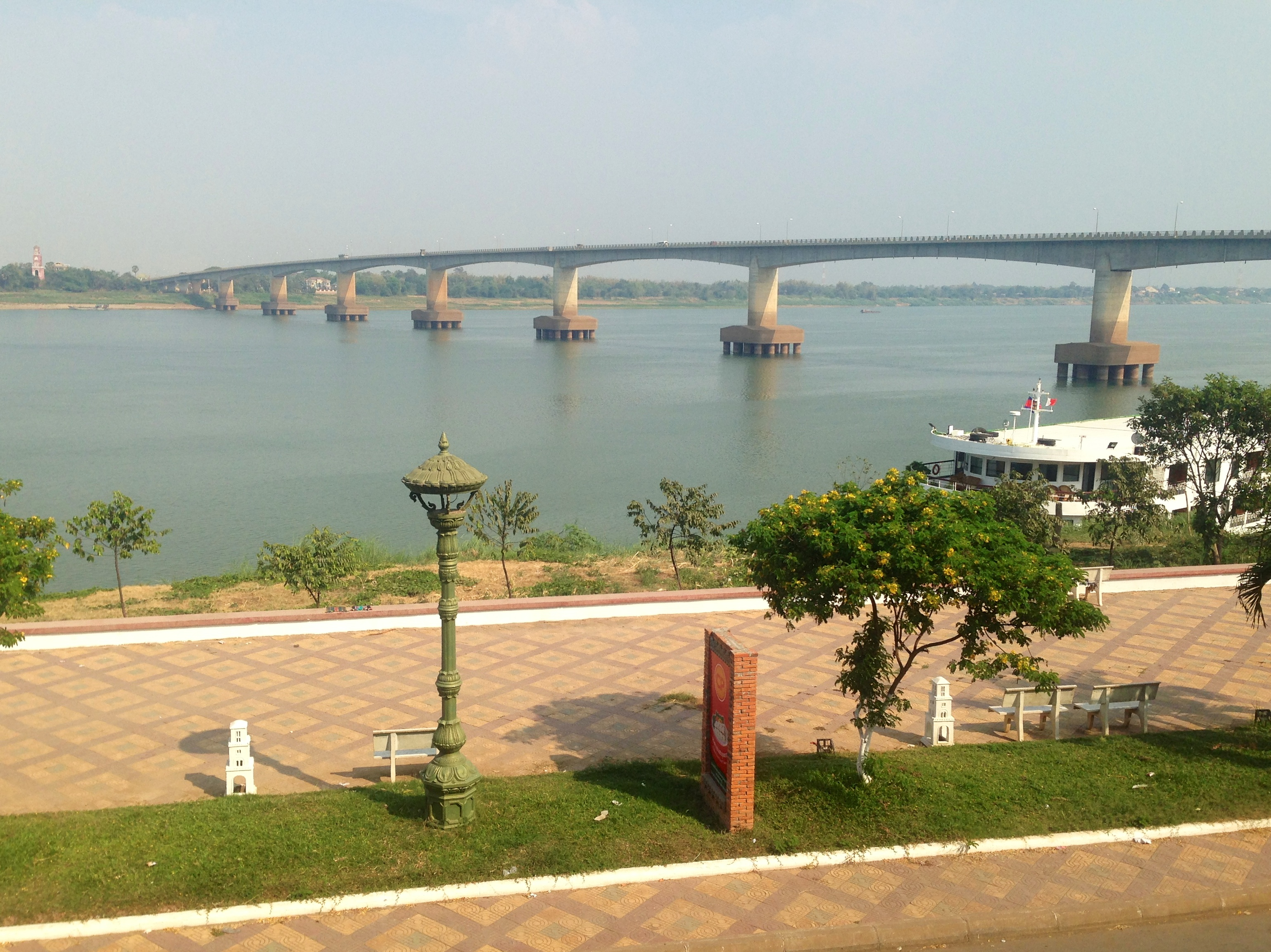 From Mekong Sunrise guesthouse